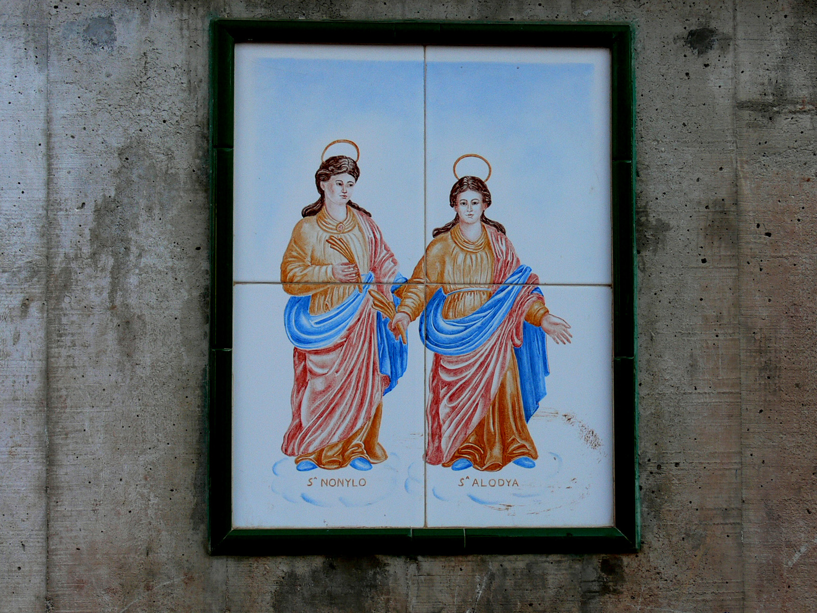 Las Santitas en Bezares - La Rioja (España).